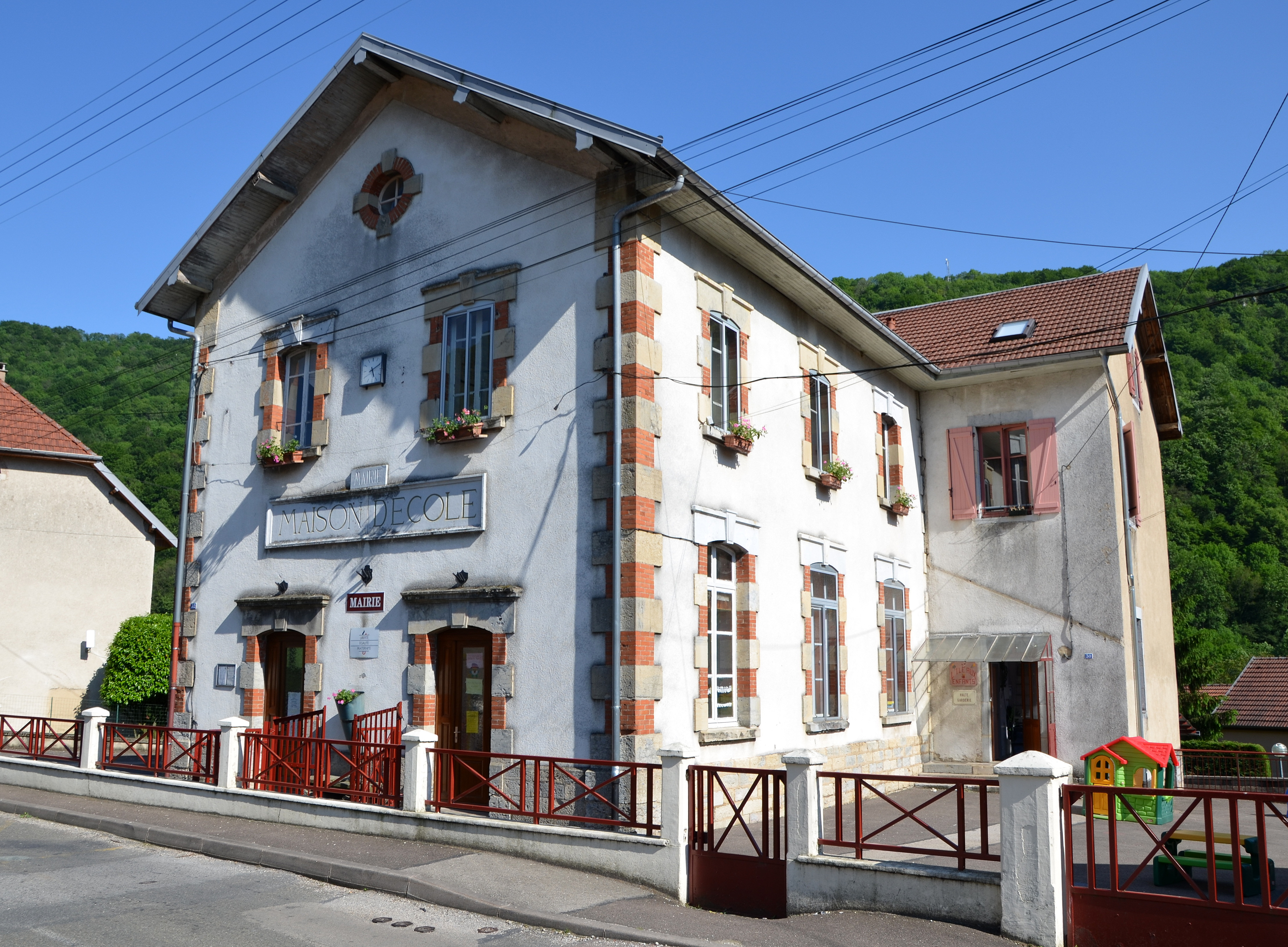 Mairie de Laissey, Doubs, Franche-Comté, France